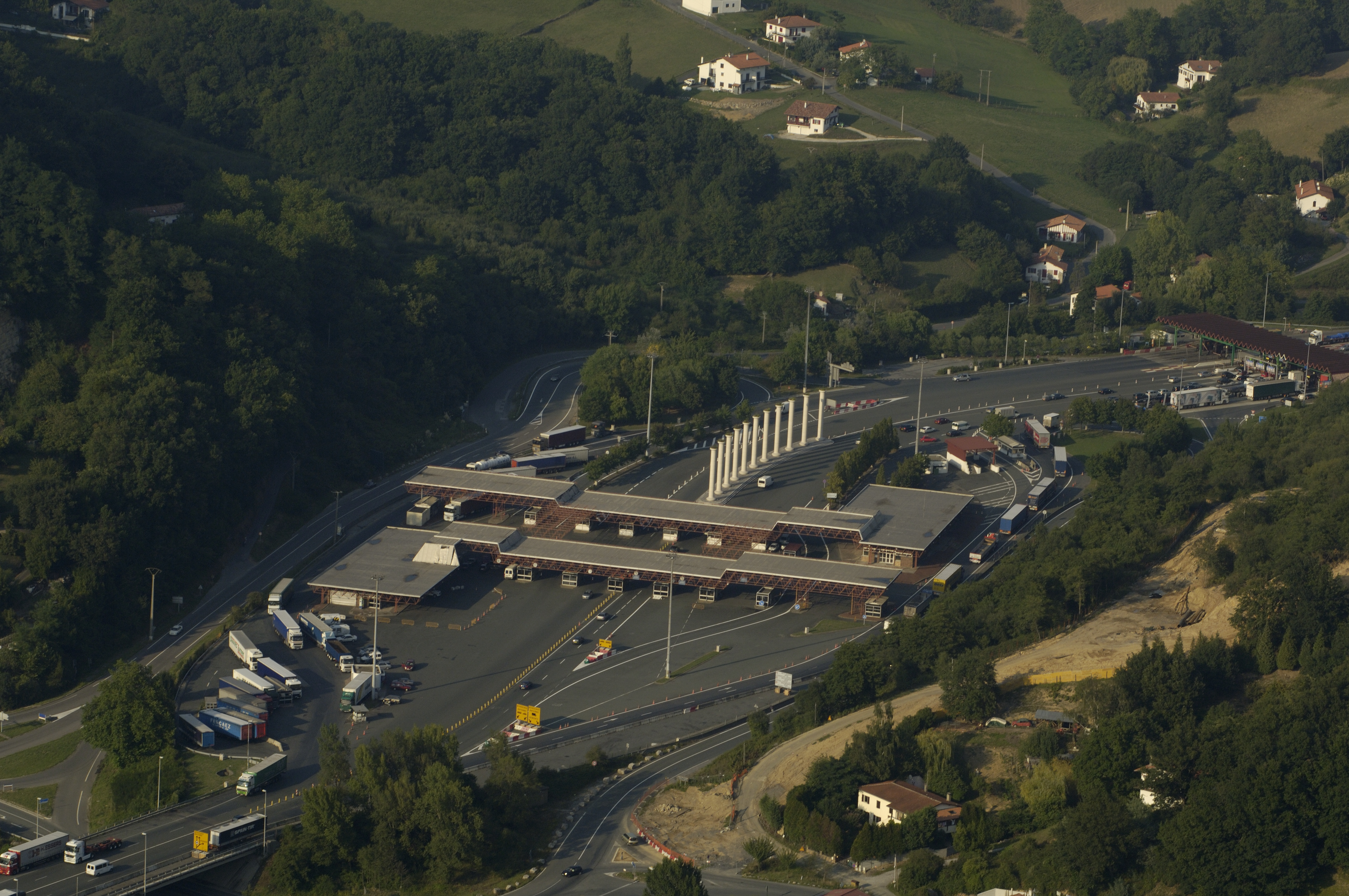 Antiguo control aduanero hispano-francés en Biriatou, sobre la A63. Hoy desaparecido. En el lugar de la aduana se encuentra el peaje de la autopista